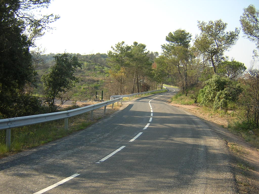 Coll Blanc (Granera, Moianès, i Mura, Bages)